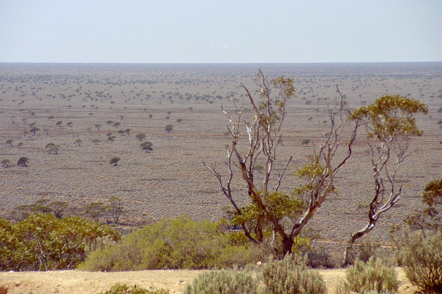 Ganz baumlos ist die Nullabor Plain doch nicht.